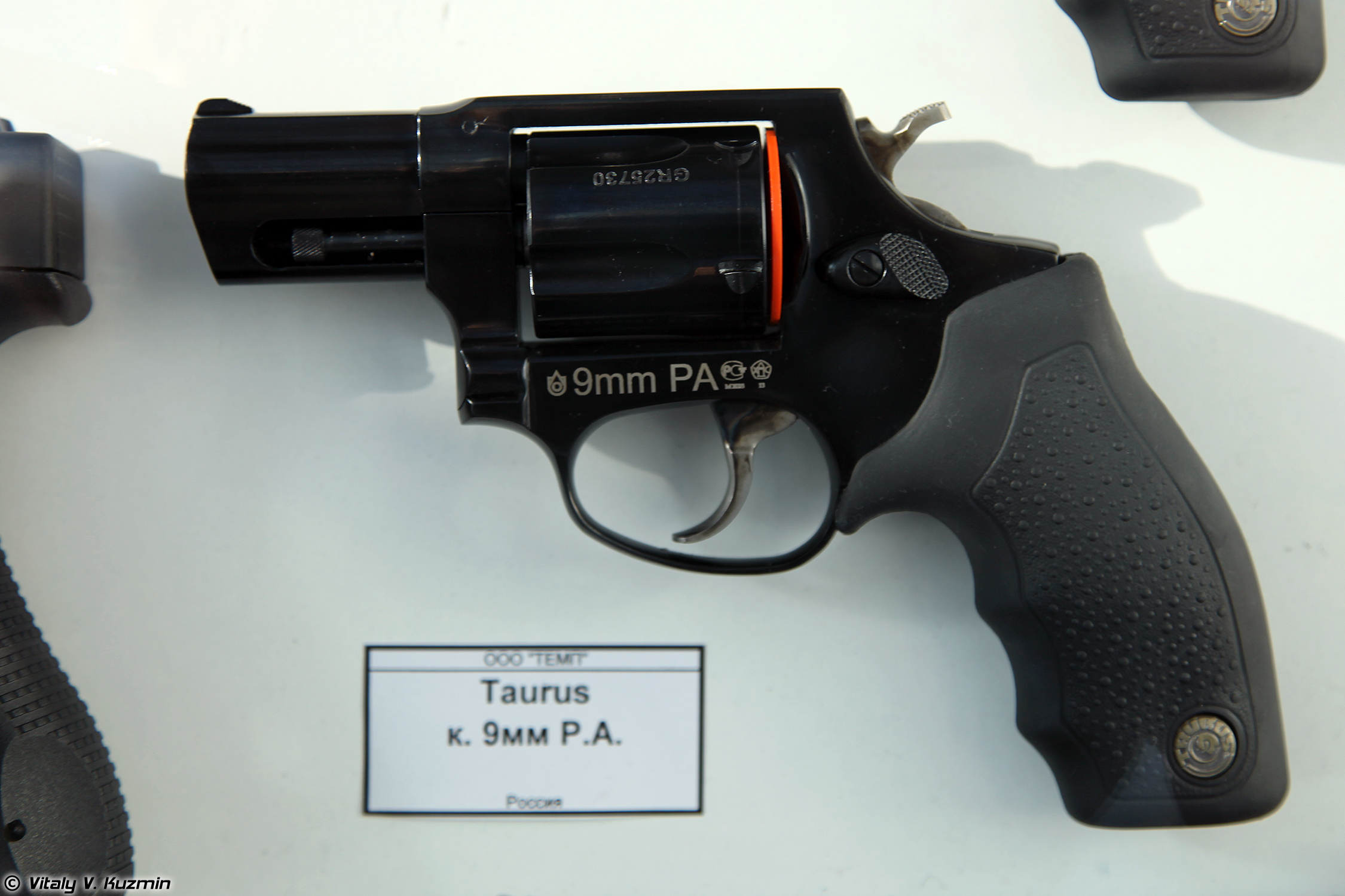 9mm PA Taurus